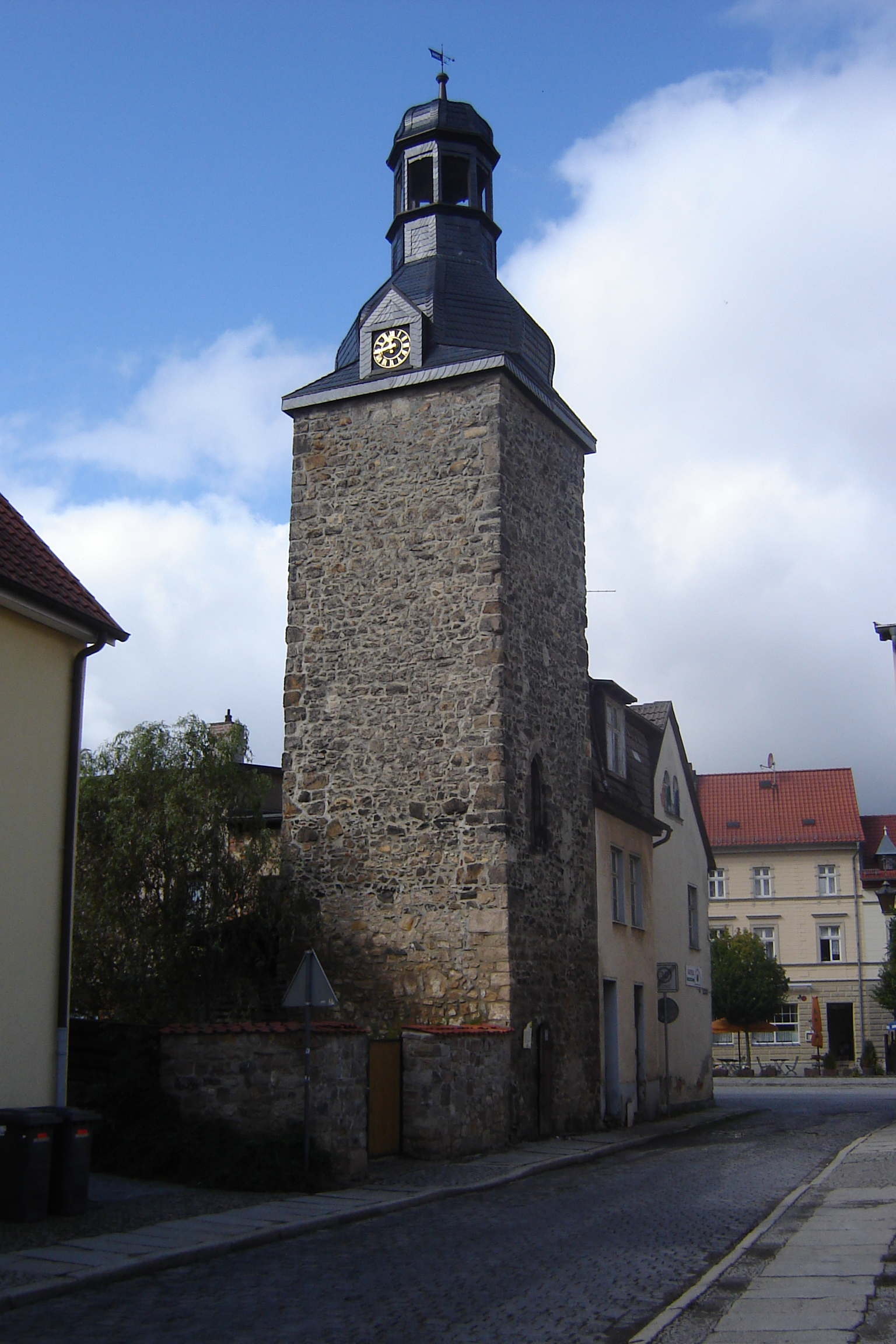 Ballenstedt, Obertor (Kulturdenkmal)